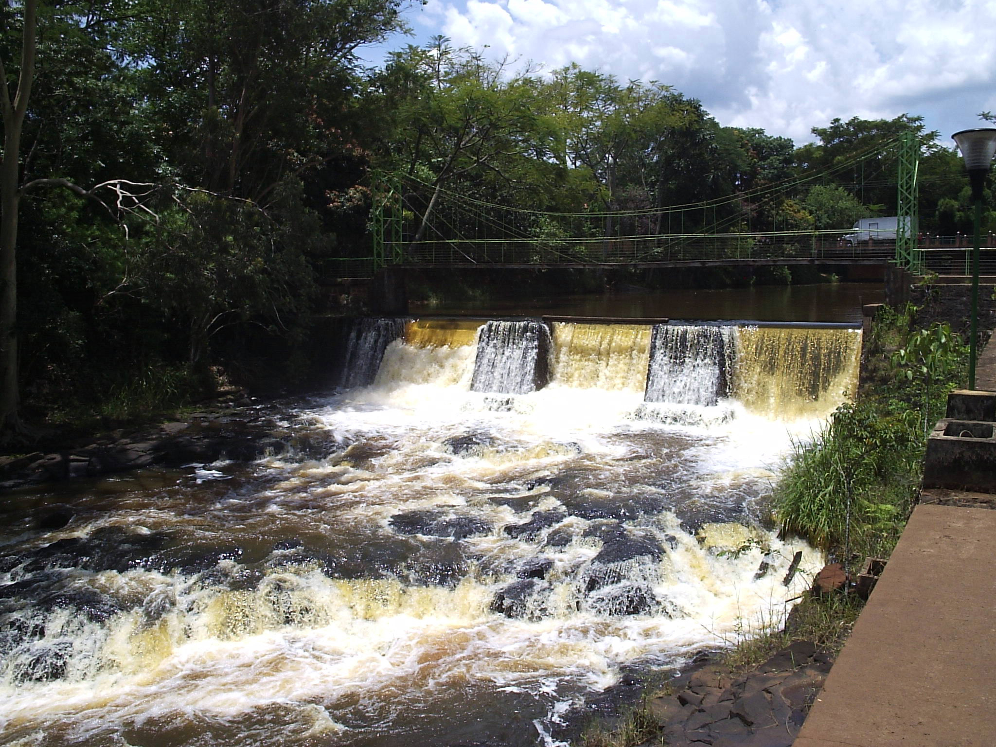 Parque dos Saltos - Rio Jacaré Pepira - Brotas